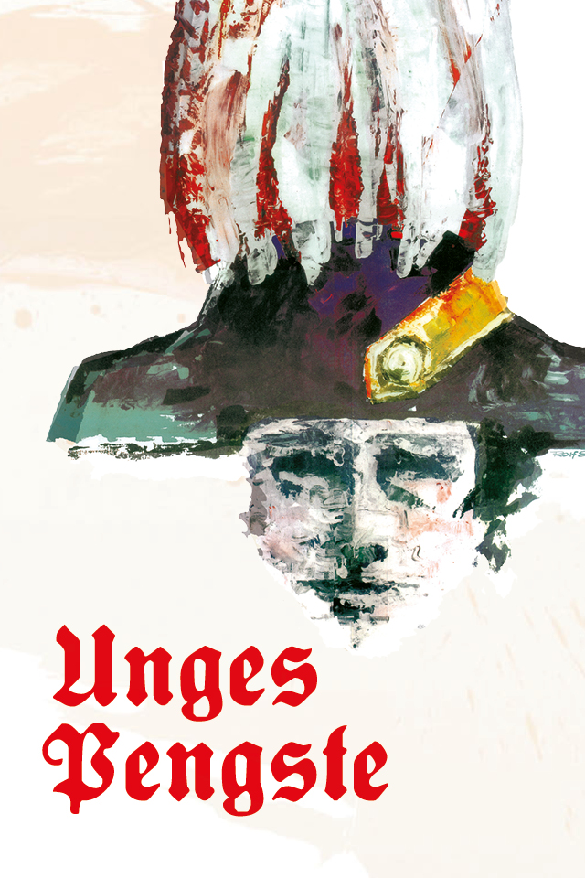 Plakat Unges Pengste in Korschenbroich